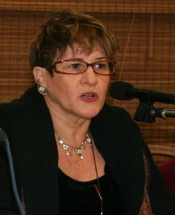 Hava Pinhas-Cohen